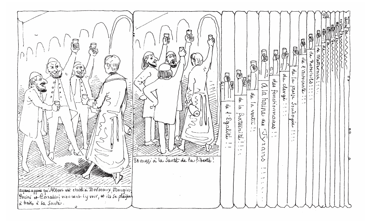 Page 24 d'Histoire d'Albert